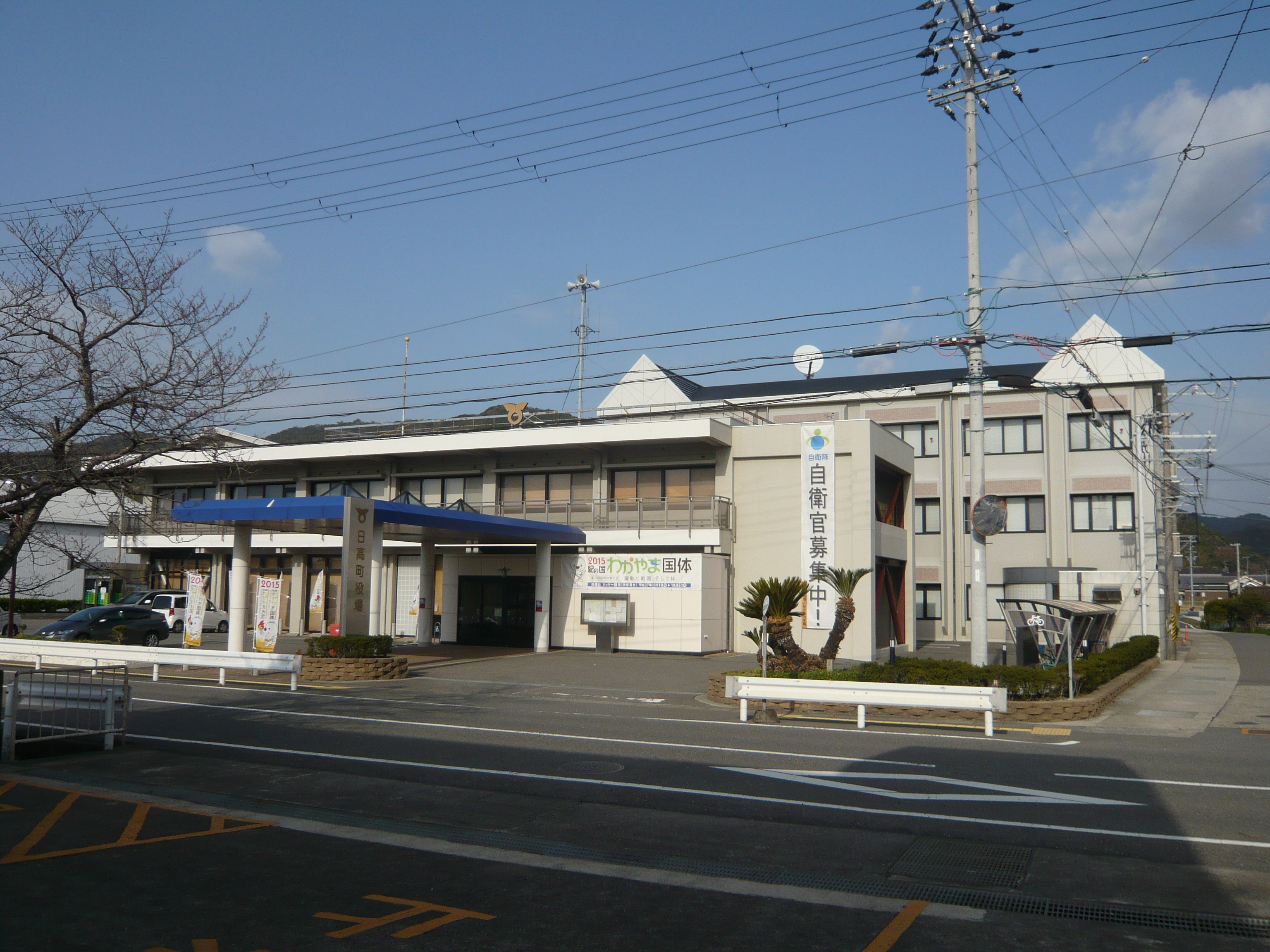 日高町役場